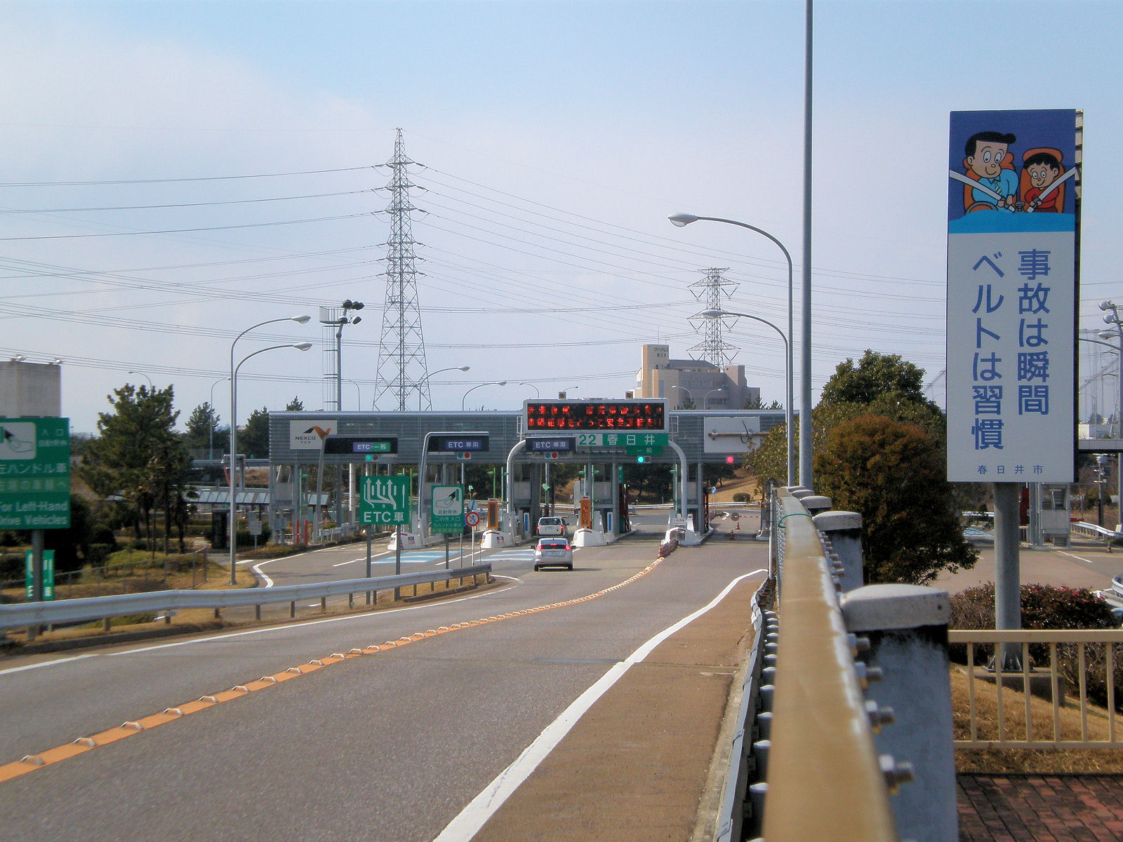 愛知県春日井市にある東名高速道路の春日井インターチェンジ。